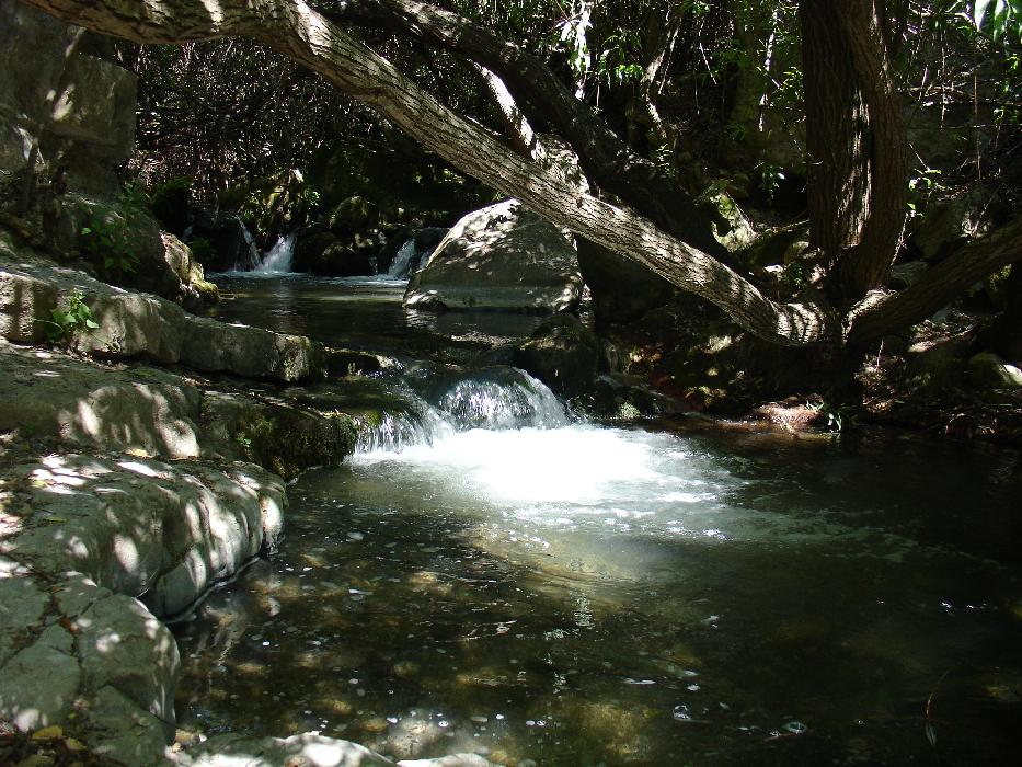 río Majaceite entre Benamahoma y El Bosque